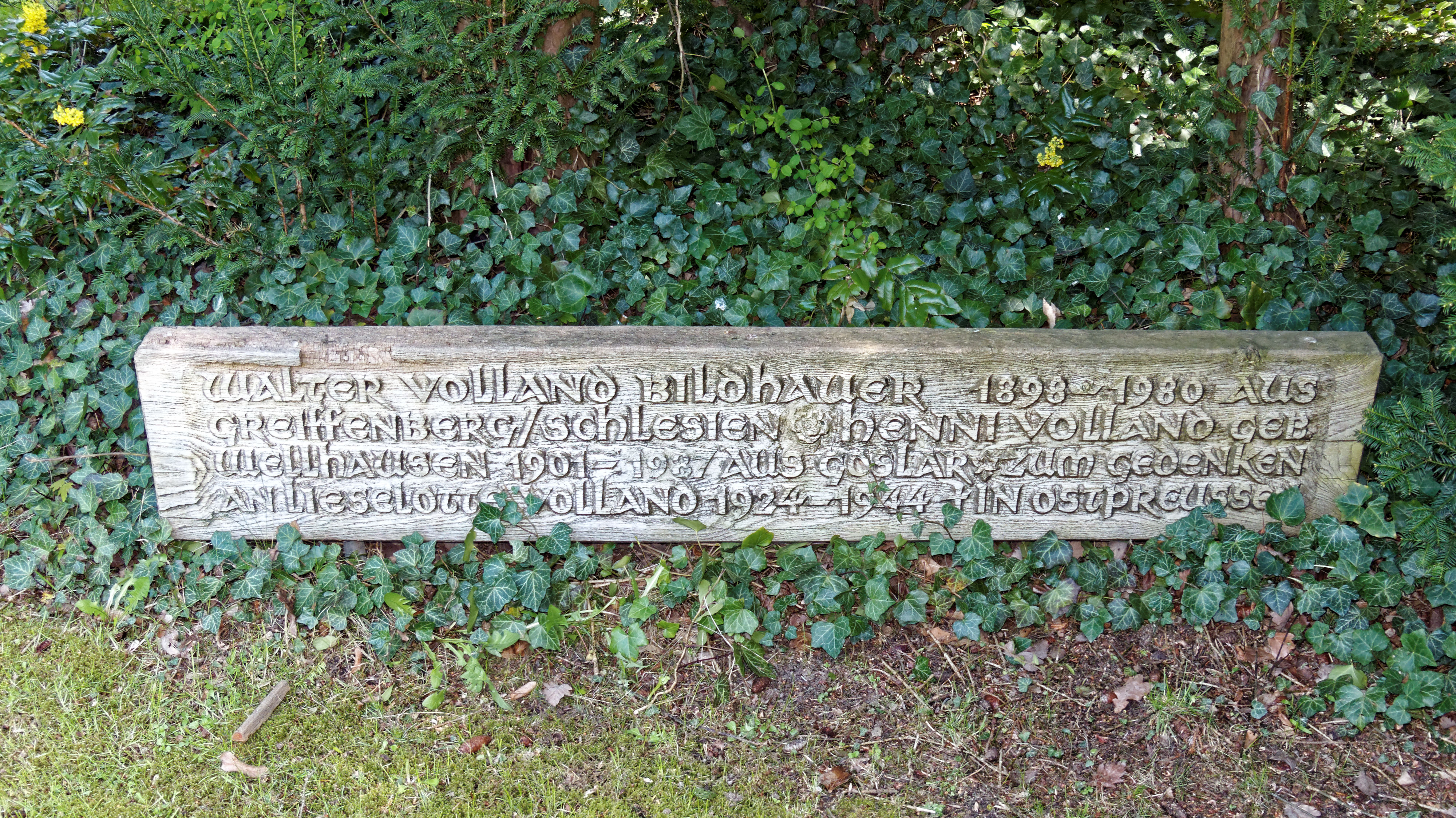 Grab von des Bildhauers Walter Volland uaf dem Neuen Friedhof an der Feldstraße in Goslar